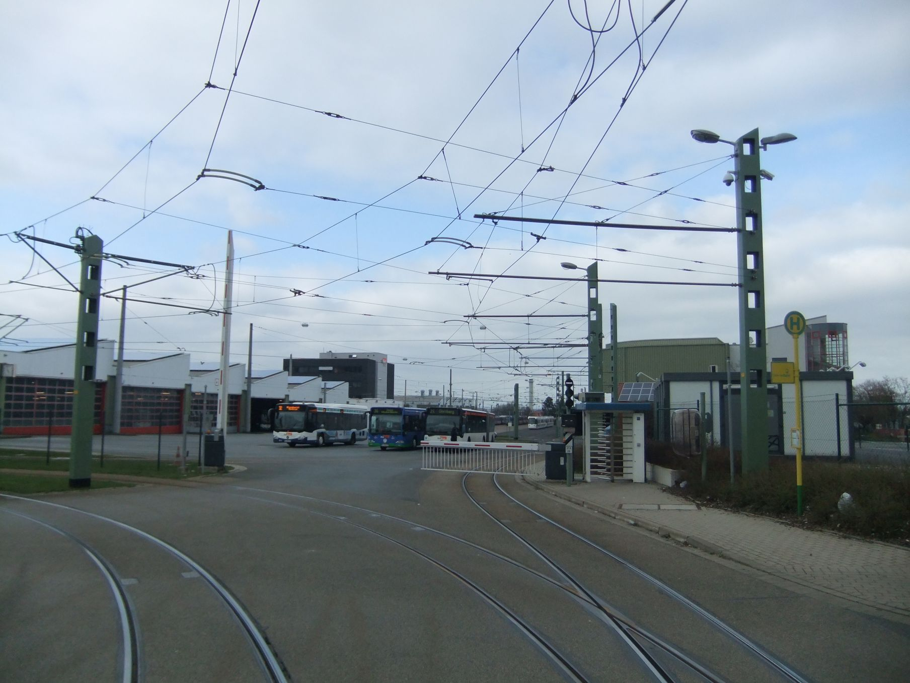 Betriebshof von moBiel für Busse und Bahnen des Verkehrsbetriebs in Bielefeld.